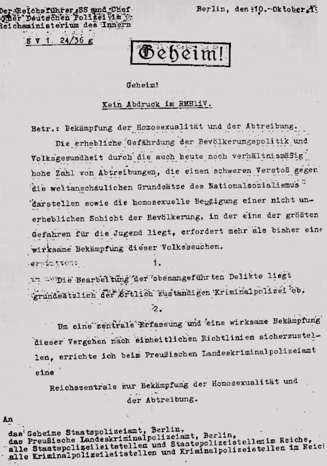 Geheimerlass Heinrich Himmlers zur Errichtung der "Reichszentrale zur Bekämpfung der Homosexualität und der Abtreibung".